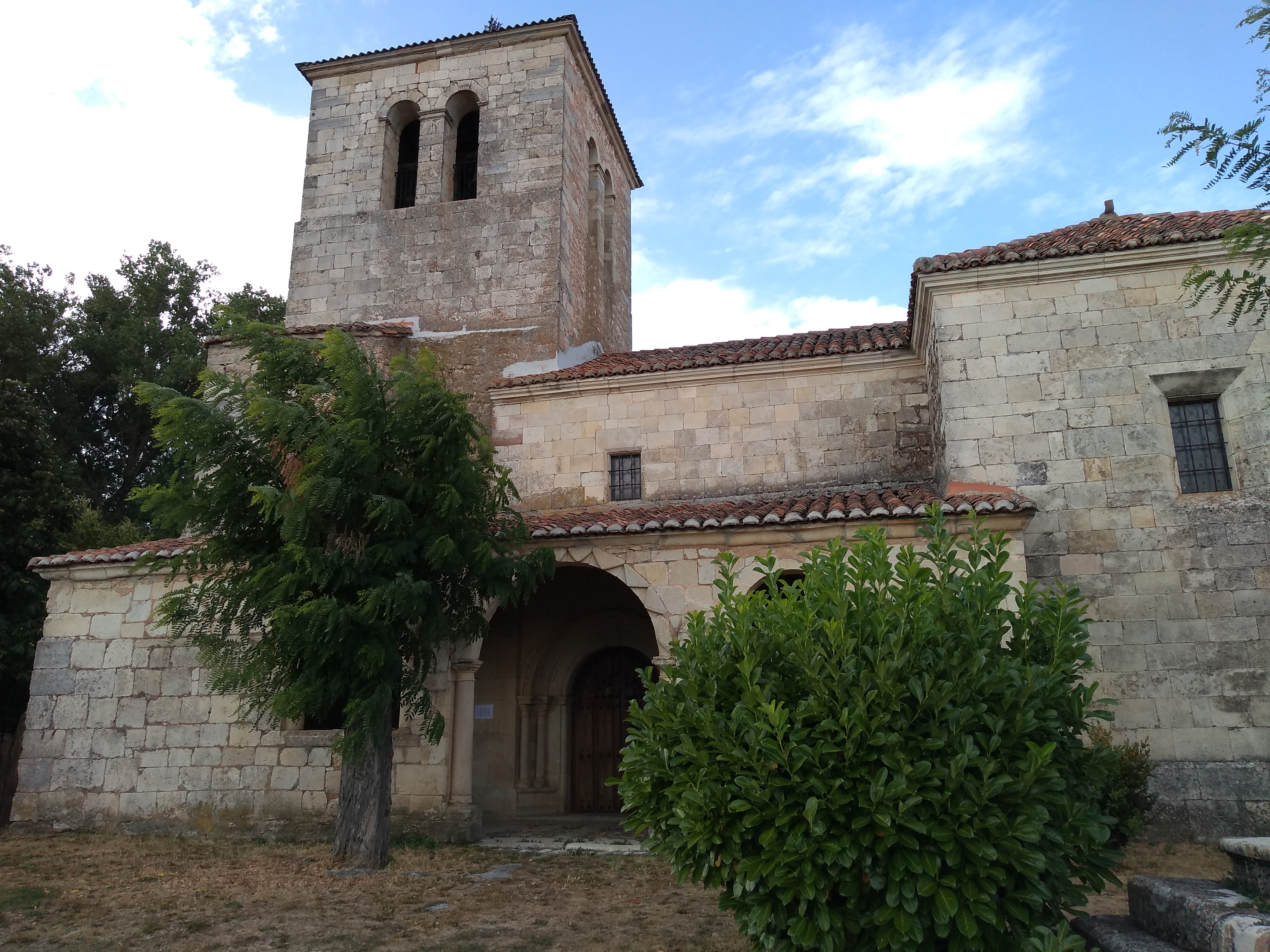 Tarilonte de la Peña (Santibáñez de la Peña)